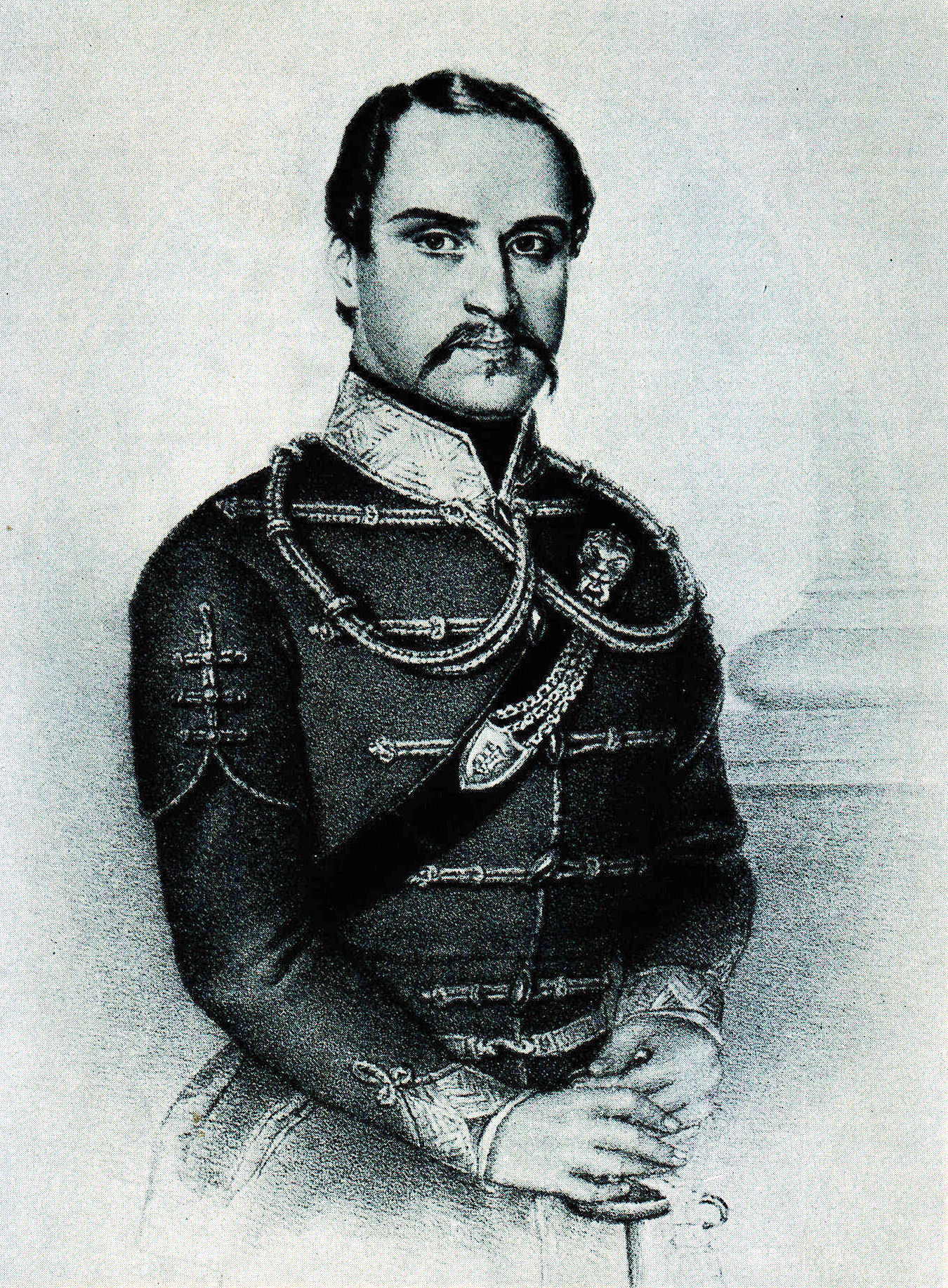 Zabolai Mikes Kelemen (1820–1849) honvéd huszár ezredes portréja. Korabeli litográfia